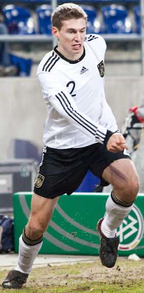 Daniel Schwaab im Trikot der deutschen U-21-Nationalmannschaft.